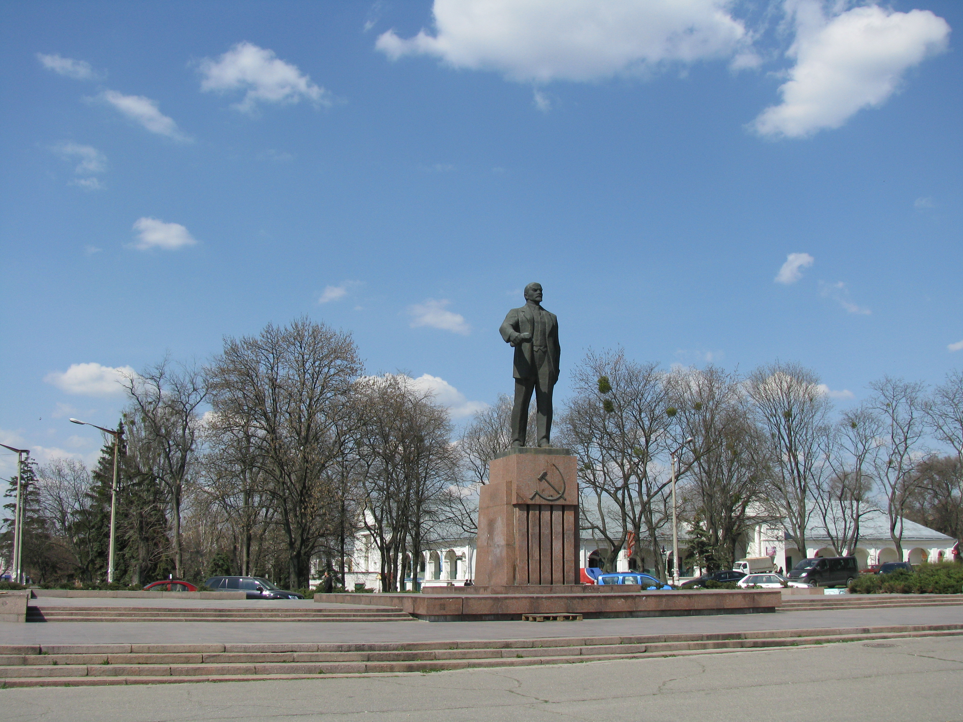 Пам'ятник В.І.Леніну Біла Церква